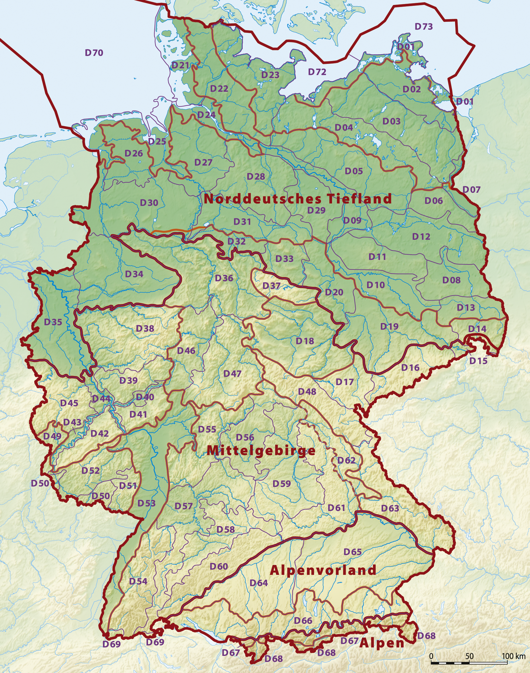 Karte der Naturräumlichen Großregionen Deutschlands; Großregionen 3. Ordnung nach dem System des Bundesamtes für Naturschutz (BfN). dunkelrote Linien: Großregion 1. Ordnung orange Linien: Großregion 2. Ordnung